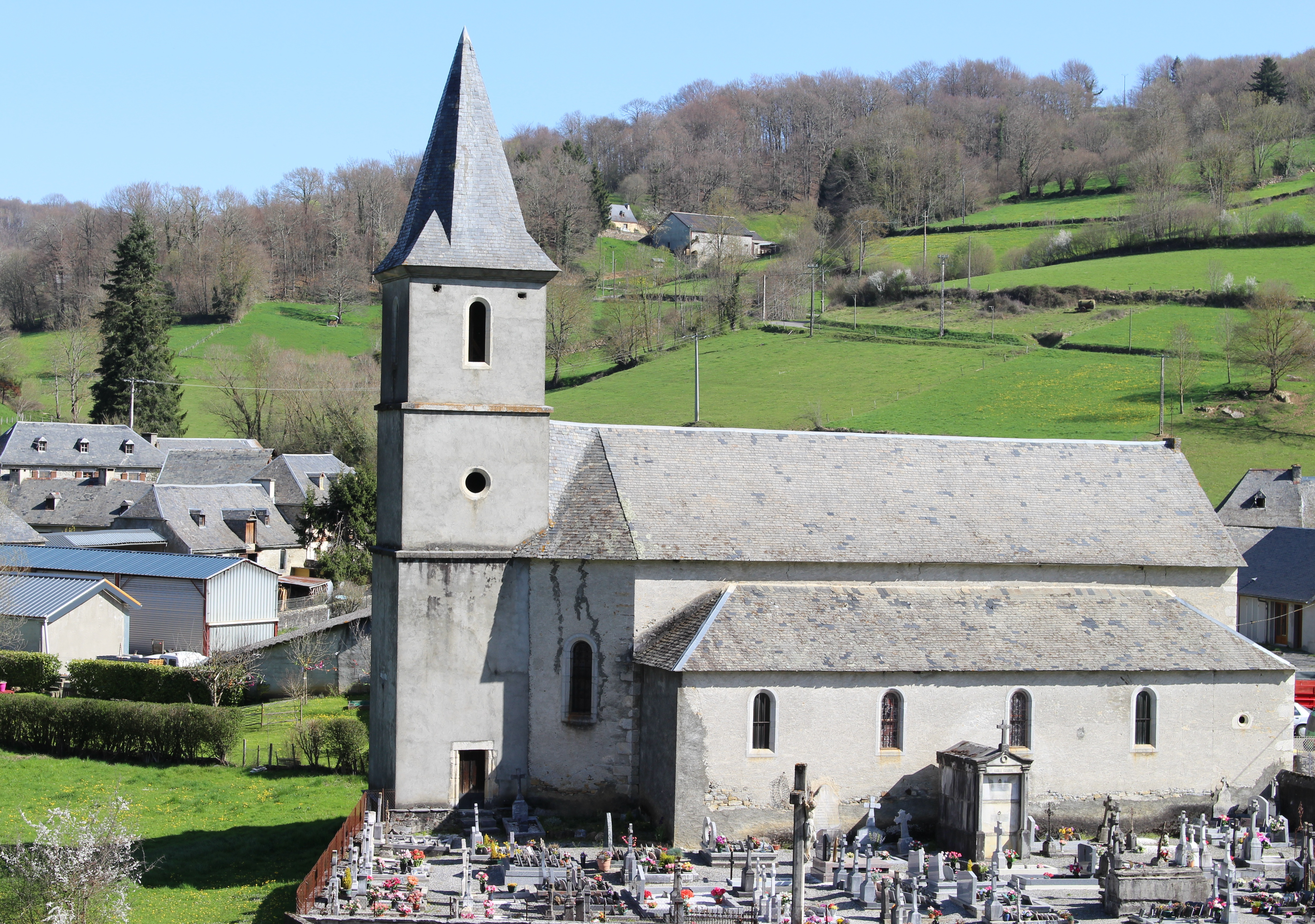 Église Saint-Vincent de Labastide (Hautes-Pyrénées)